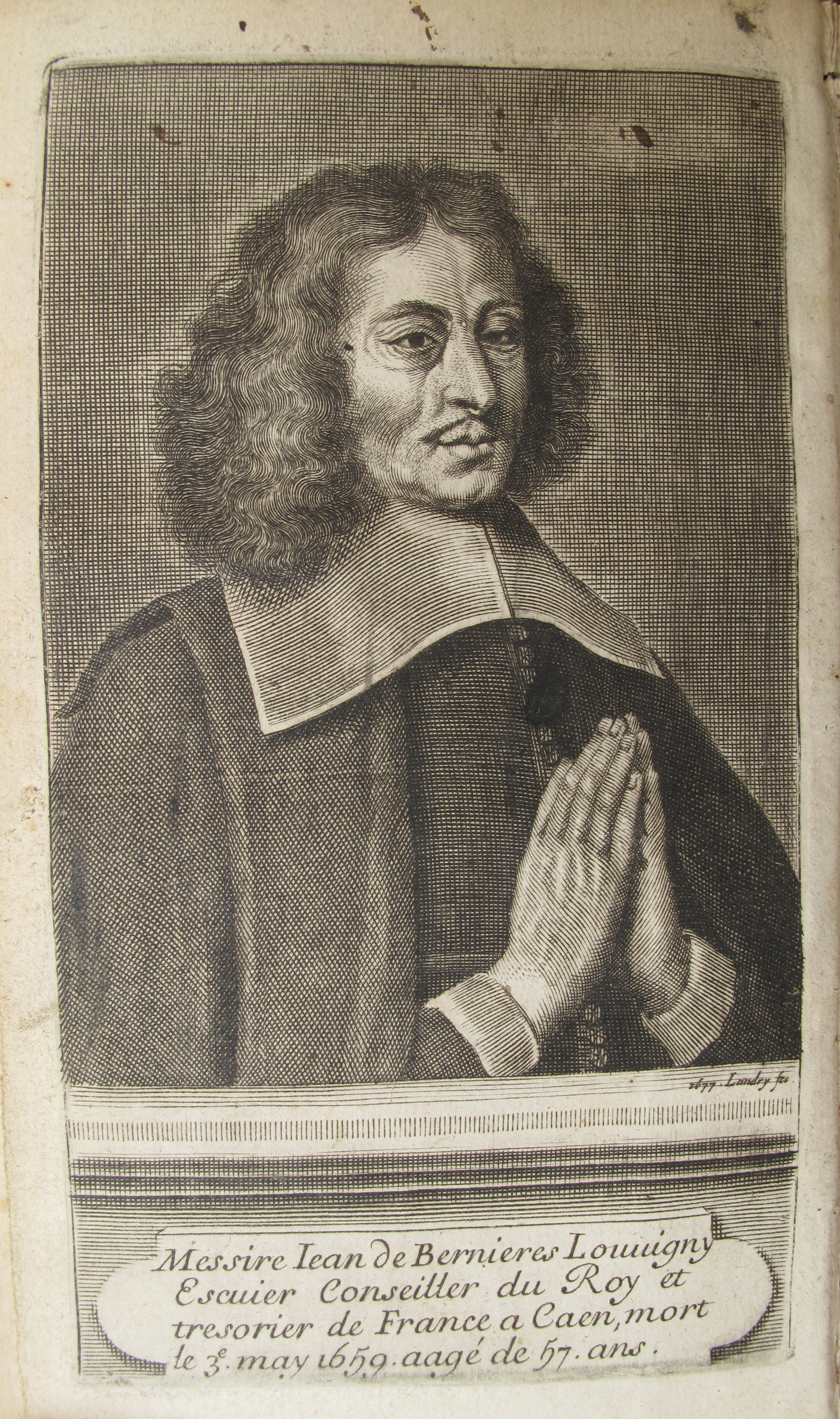 gravure ancienne de Bernières